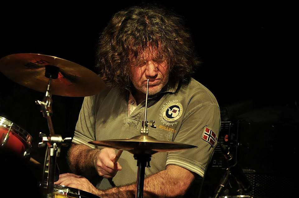 Andy Pilger bei der Birthday Attack mit Aniko, Roland Peil, Claus Fischer, Hanno Busch, René Pütz, Jörg Hamers und Heinz Hox (alle nicht im Bild) am 27.01.2016 im Steinbruch Duisburg.